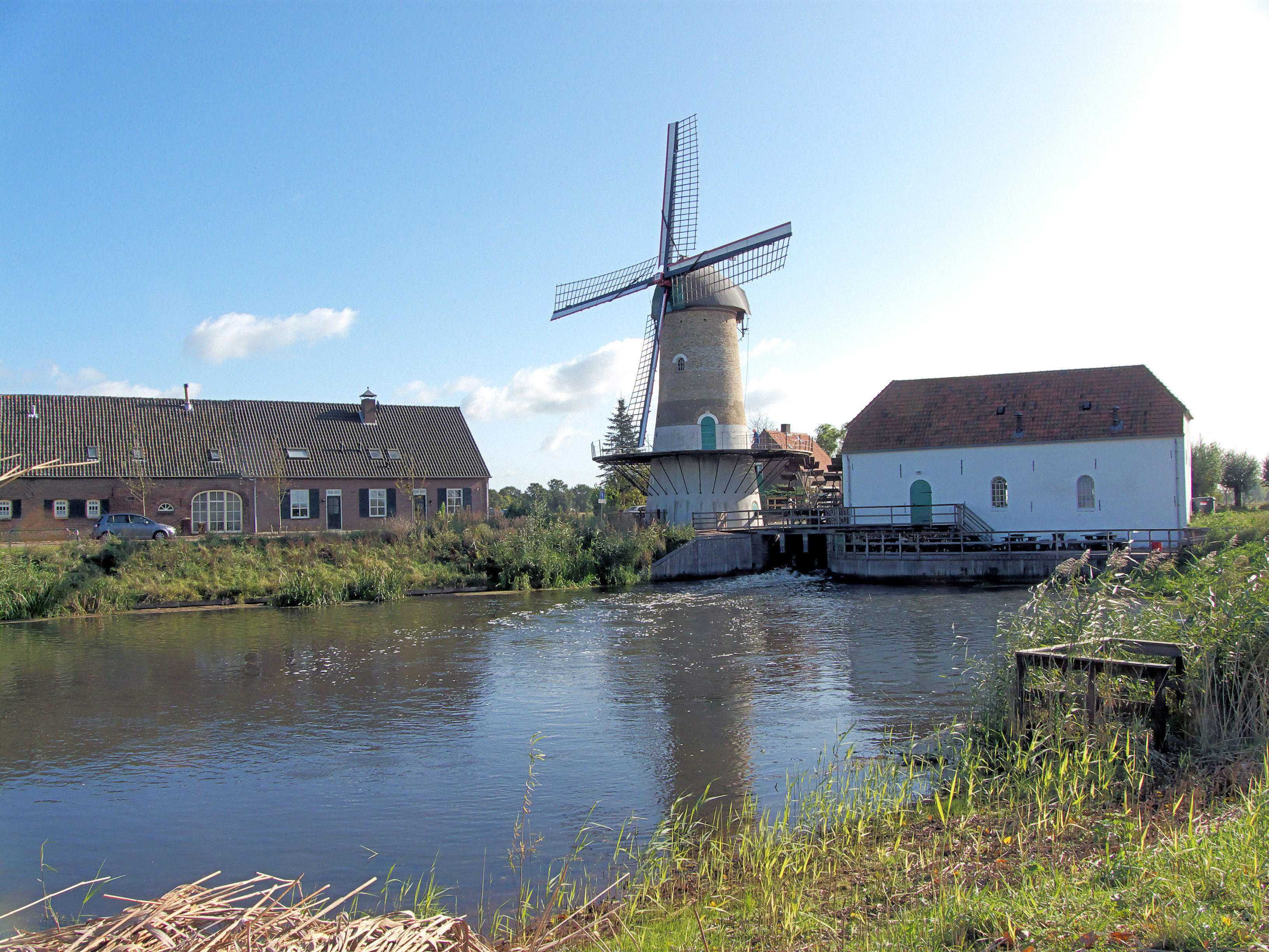 Kilsdonkse molen, Dinther